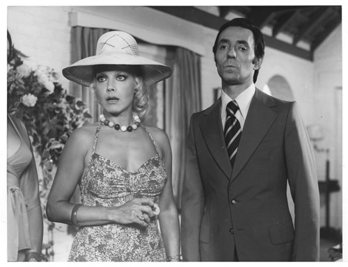 Mariquita Gallegos y Tristán en la película La guerra de los sostenes (1976).